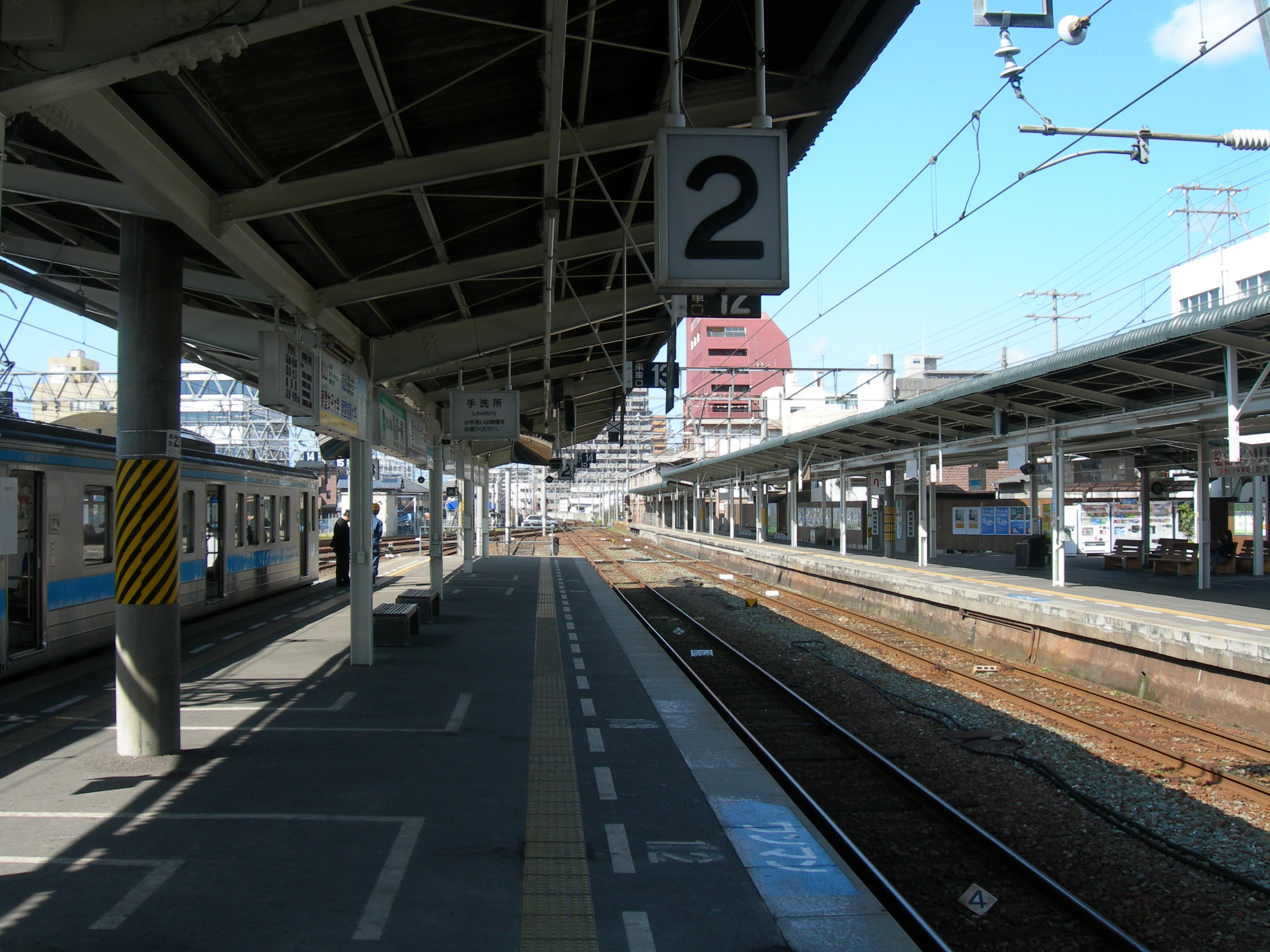 松山駅プラットホーム